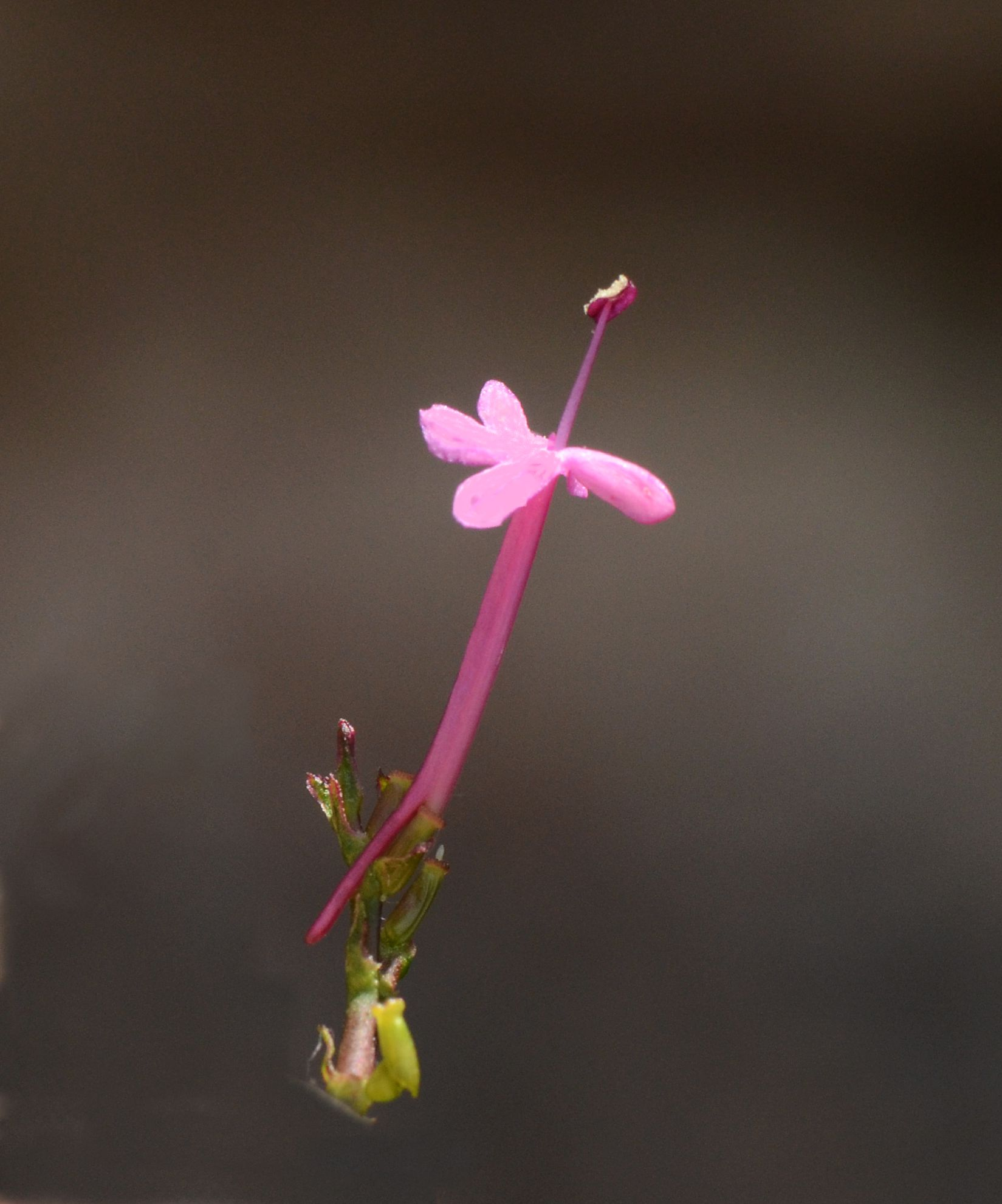 Fleur isolée de Centranthus ruber, avec éperon. Boutiers 16100